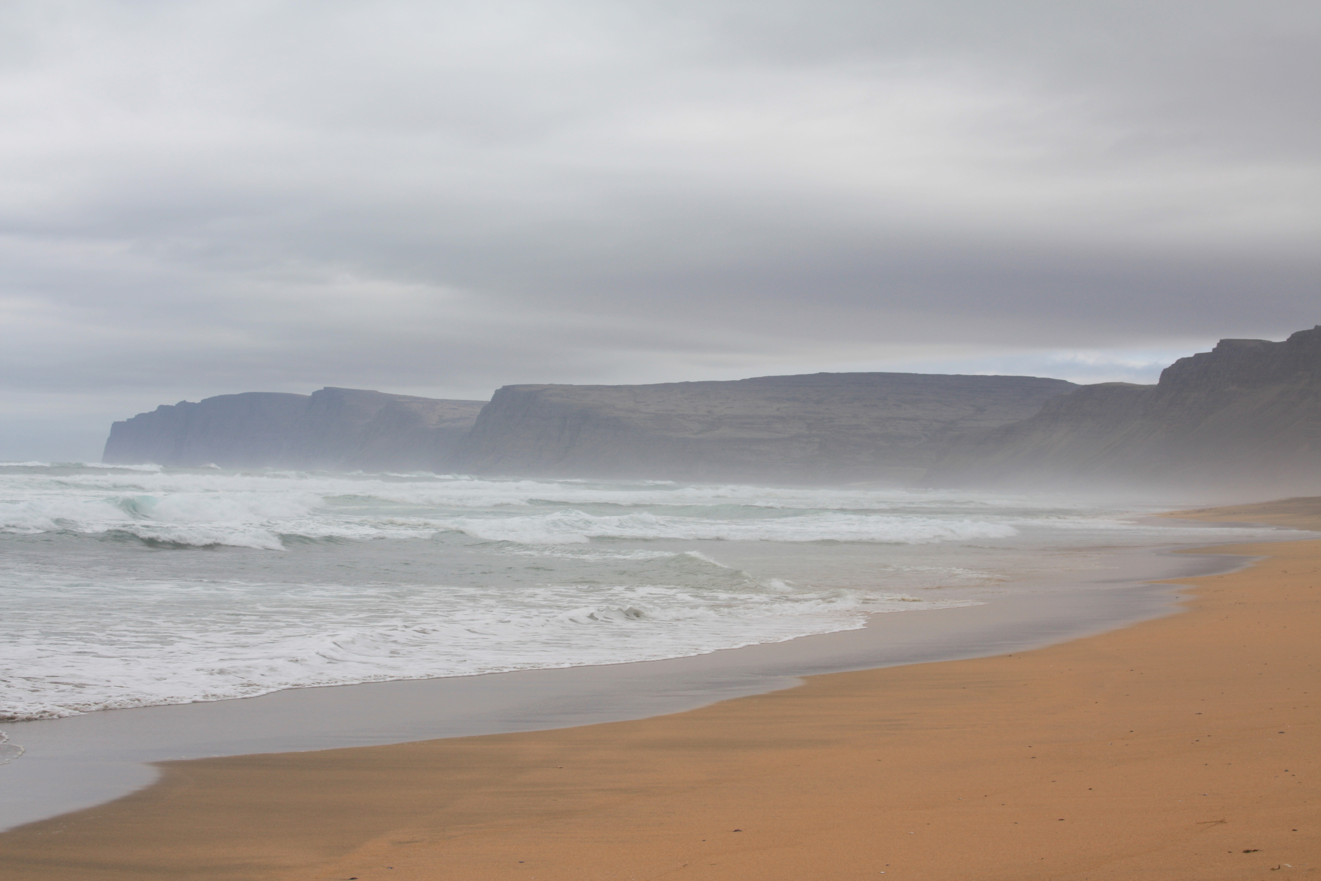 Rauðasandur, longest beach in WestFjords